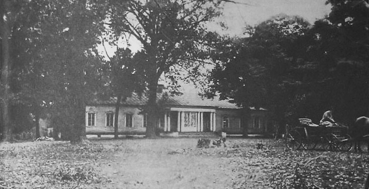 Беларуская (тарашкевіца): Хвойнікі (Chvojniki), сядзіба Прозараў (Prozar)